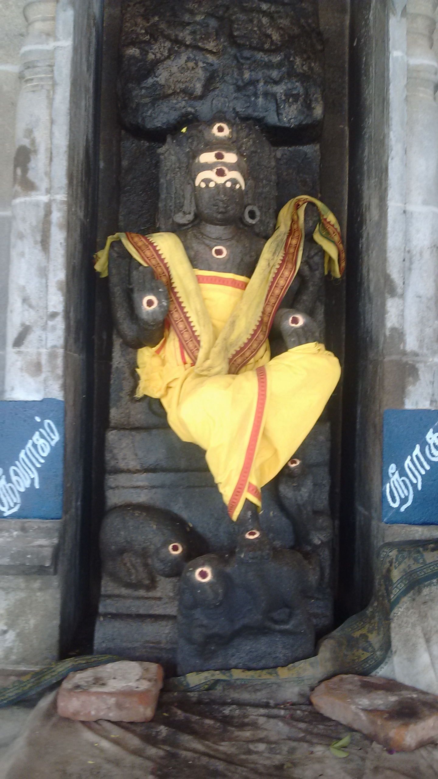 உட்படங்கள்